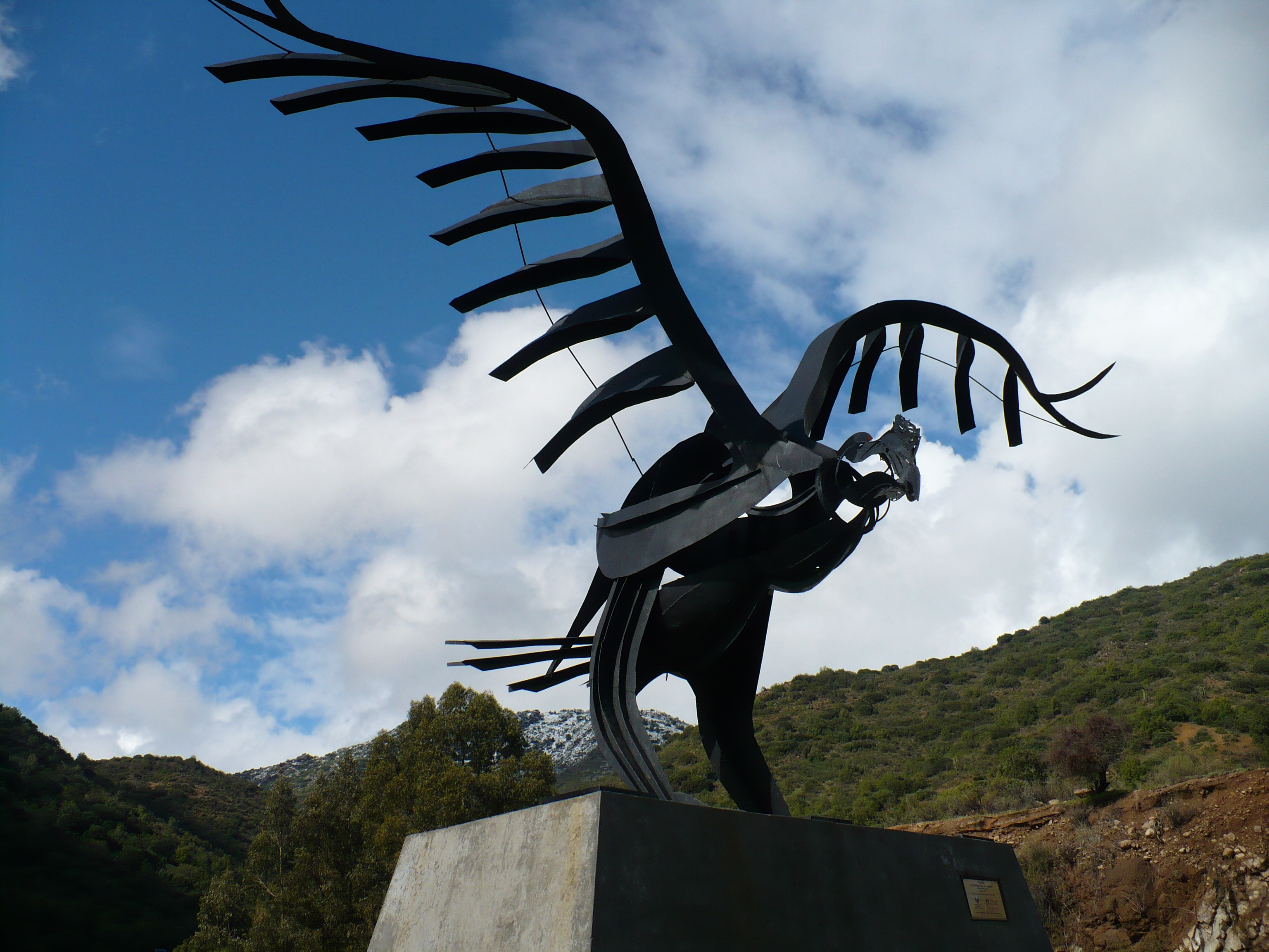 Escultura ubicada en Carretera El Cobre Km, 14 comuna de Machalí